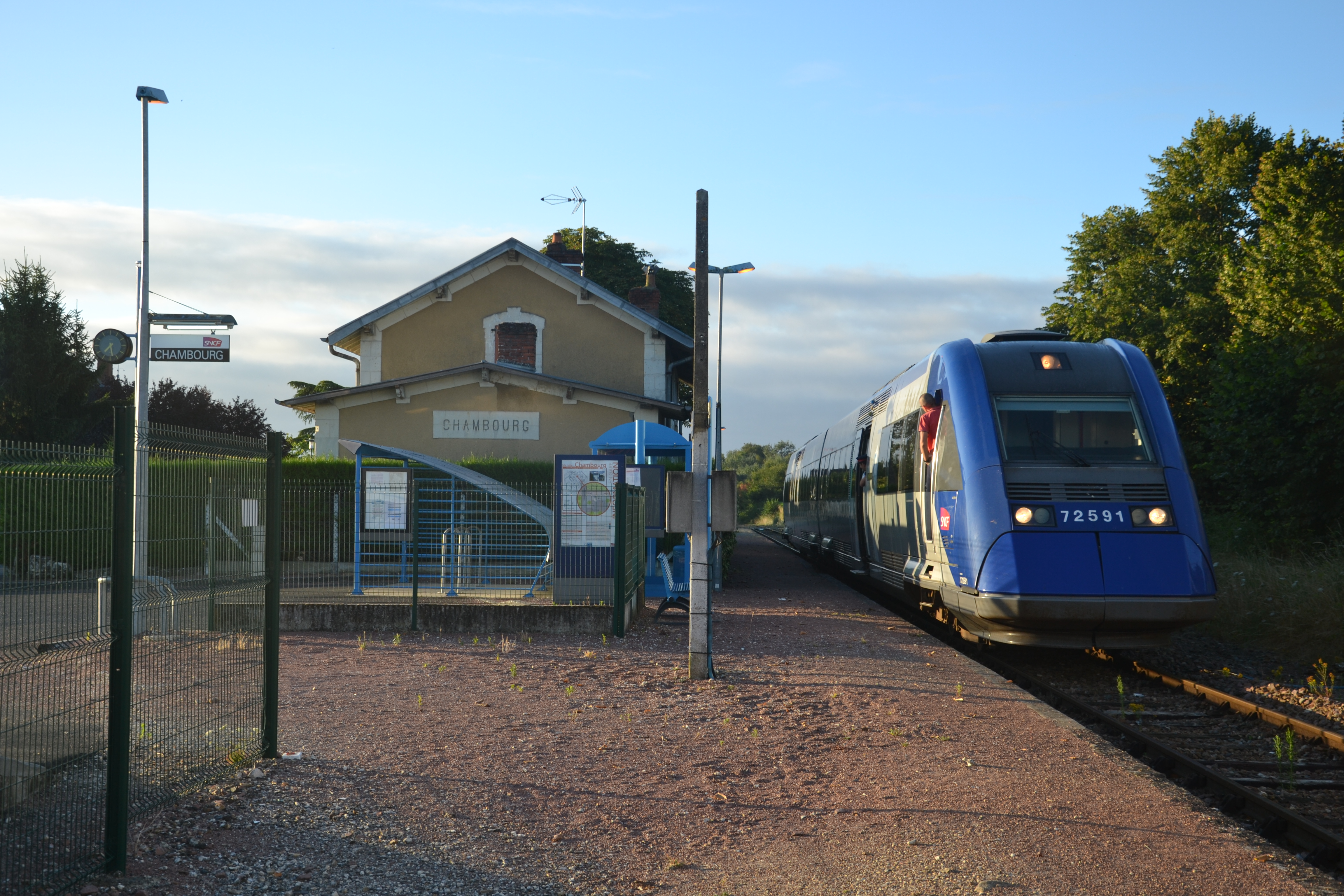 Arrêt du TER n°860 362